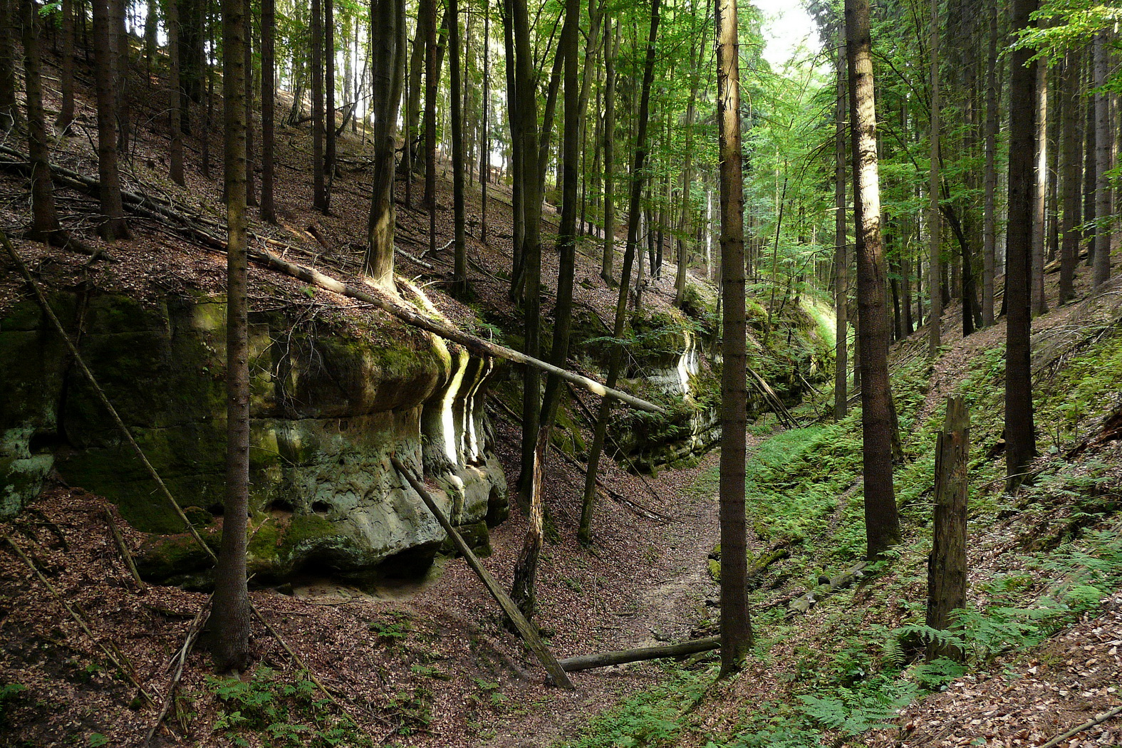 Bukovské ochozy pod vrchem Orlí